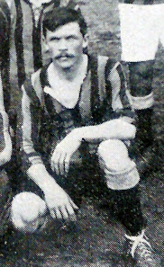 Harry Hayes, jugador de Rosario Central en 1913.